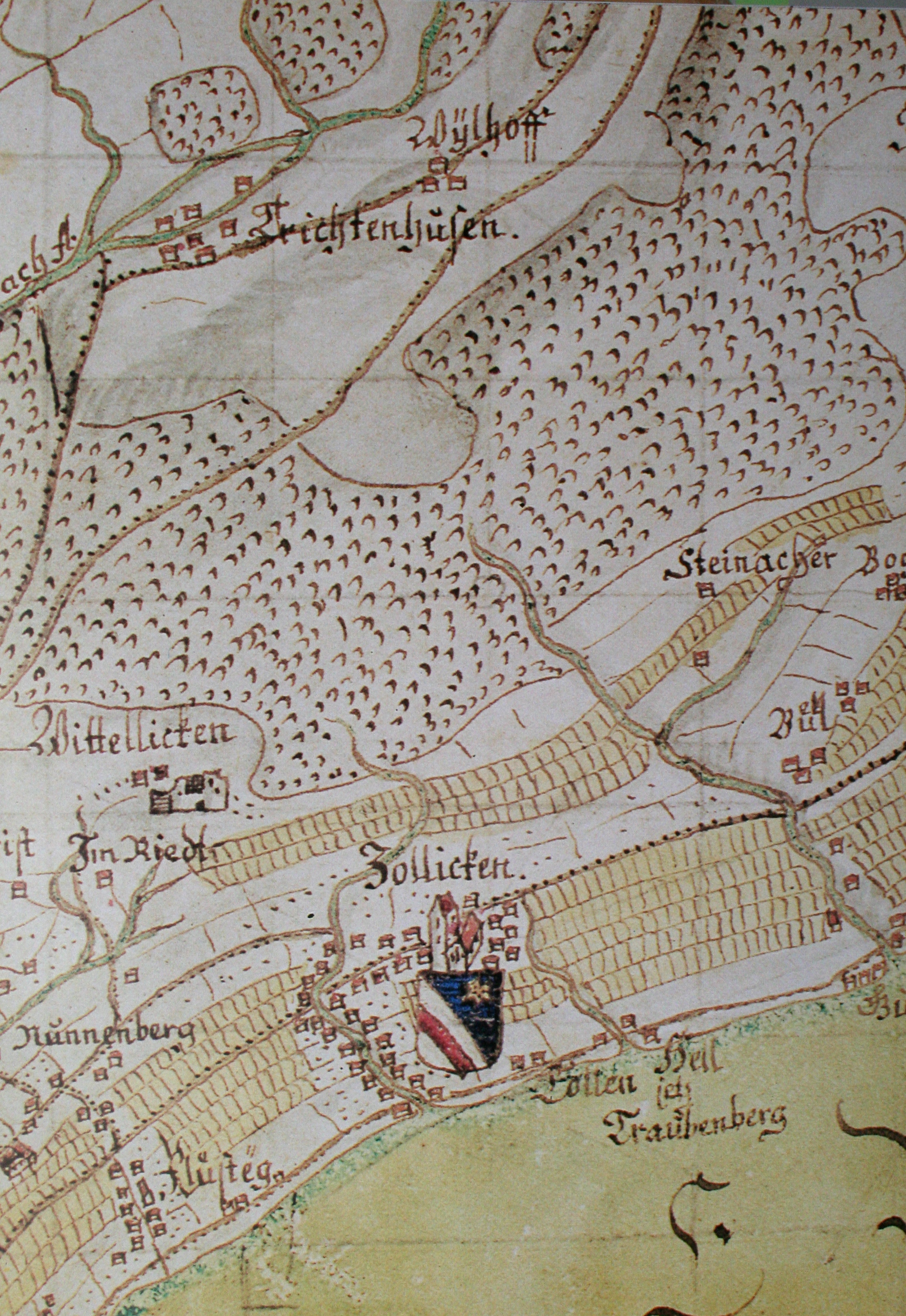 Zollikon in der Gygerkarte von 1667 (Umzeichnung 18. Jahrhundert)